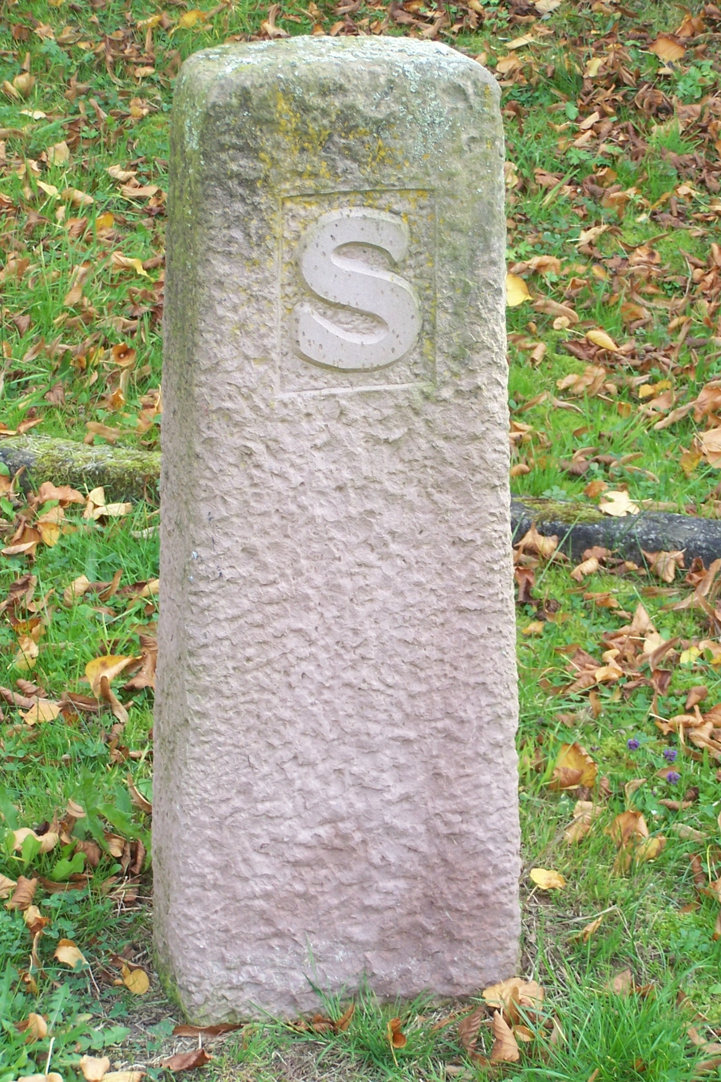 Der Markierungsstein zeigt den Beginn des Wanderweges Sallmannshäuser Rennsteig an.